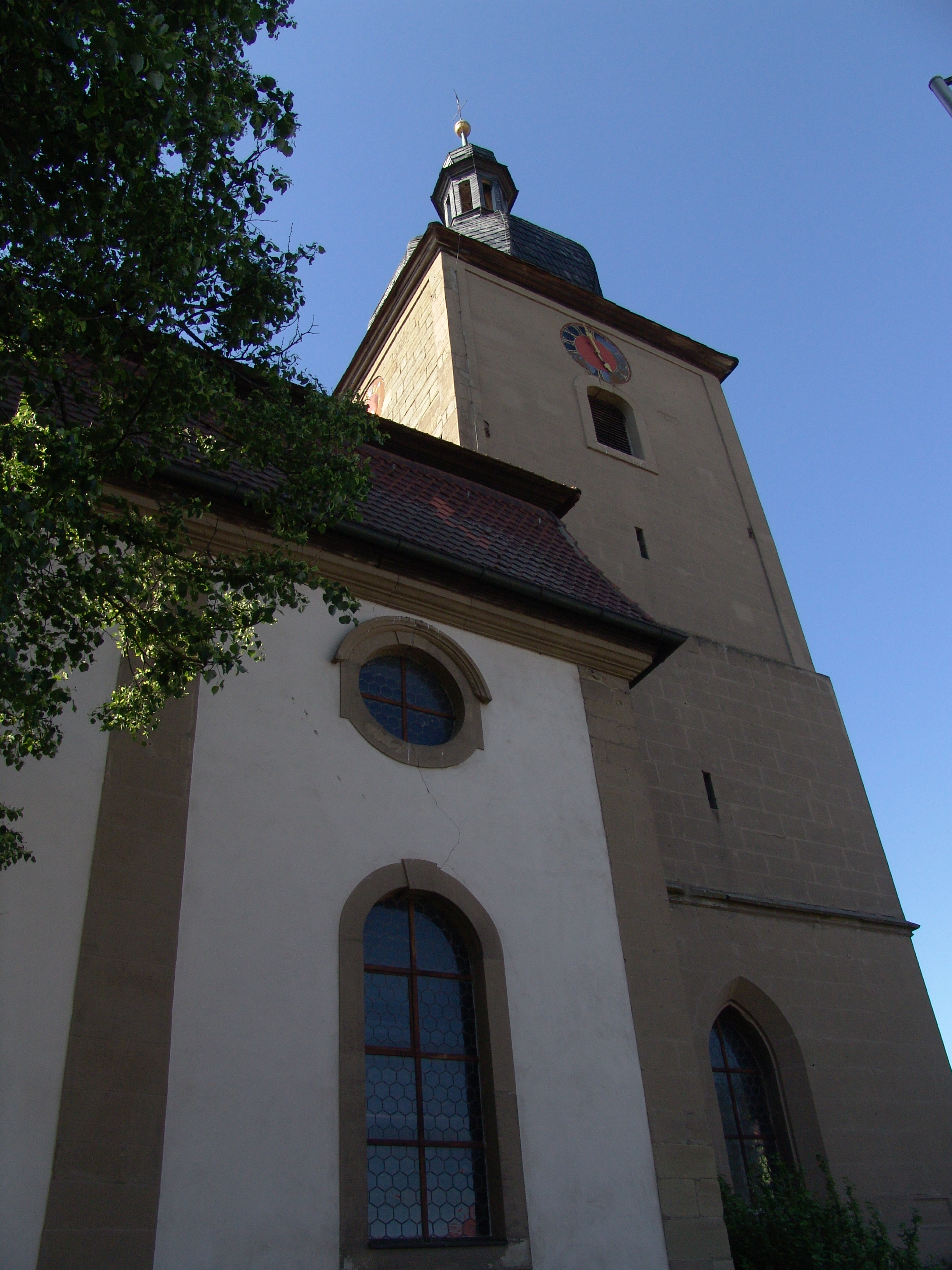 evang.-luth. Kirche St. Katherina in Schauernheim